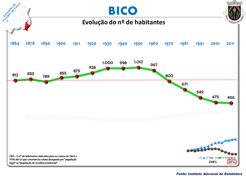 Censos 1864/2011